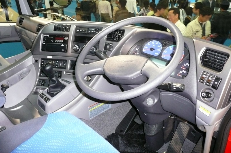 Nissan Diesel Quon interior.